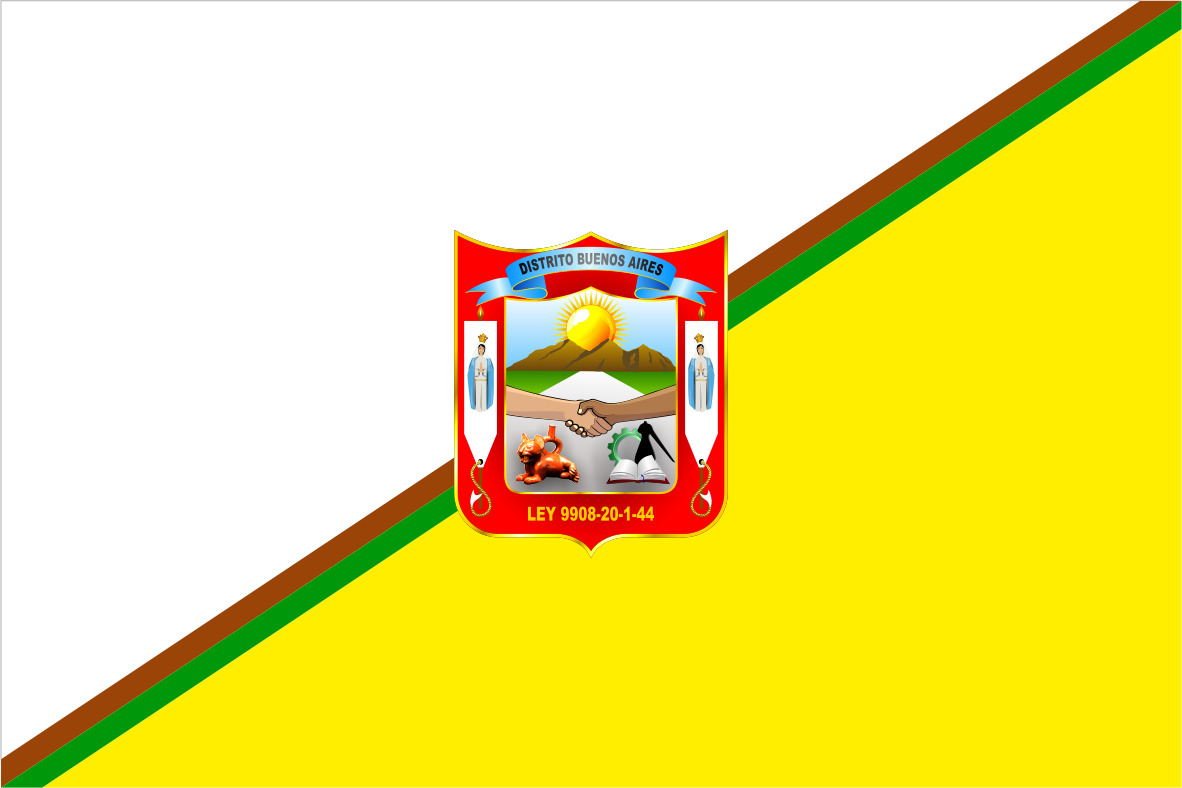 El diseño de nuestra bandera pertenece a la Prof. GUSNARA ODAR JIMENEZ. Inspirada en el gran amor, por esta tierra querida, que es para mi Madre Patria, diseño esta bandera de la siguiente manera con los siguientes colores tienen un significado muy especial: EL COLOR AMARILLO Representa la calidez de su tierra, los granos y pastos naturales que constituyen el mejor regalo divino, para su gente y alimentos para la producción ganadera. EL COLOR BLANCO: Es el símbolo de paz de este pueblo, creyente en Dios y también representa la generosidad de sus pobladores. EL COLOR VERDE Y MARRÓN (FRANJAS): dispuestas transversalmente ascendente refleja el gran potencial agrícola en sus fértiles tierras, riqueza que tiene como producto de bandera el PLÁTANO (verde) y el CACAO (marrón), ecológico que son el gran despliegue económico para los hogares de esta tierra NOBLE Y GENEROSA.